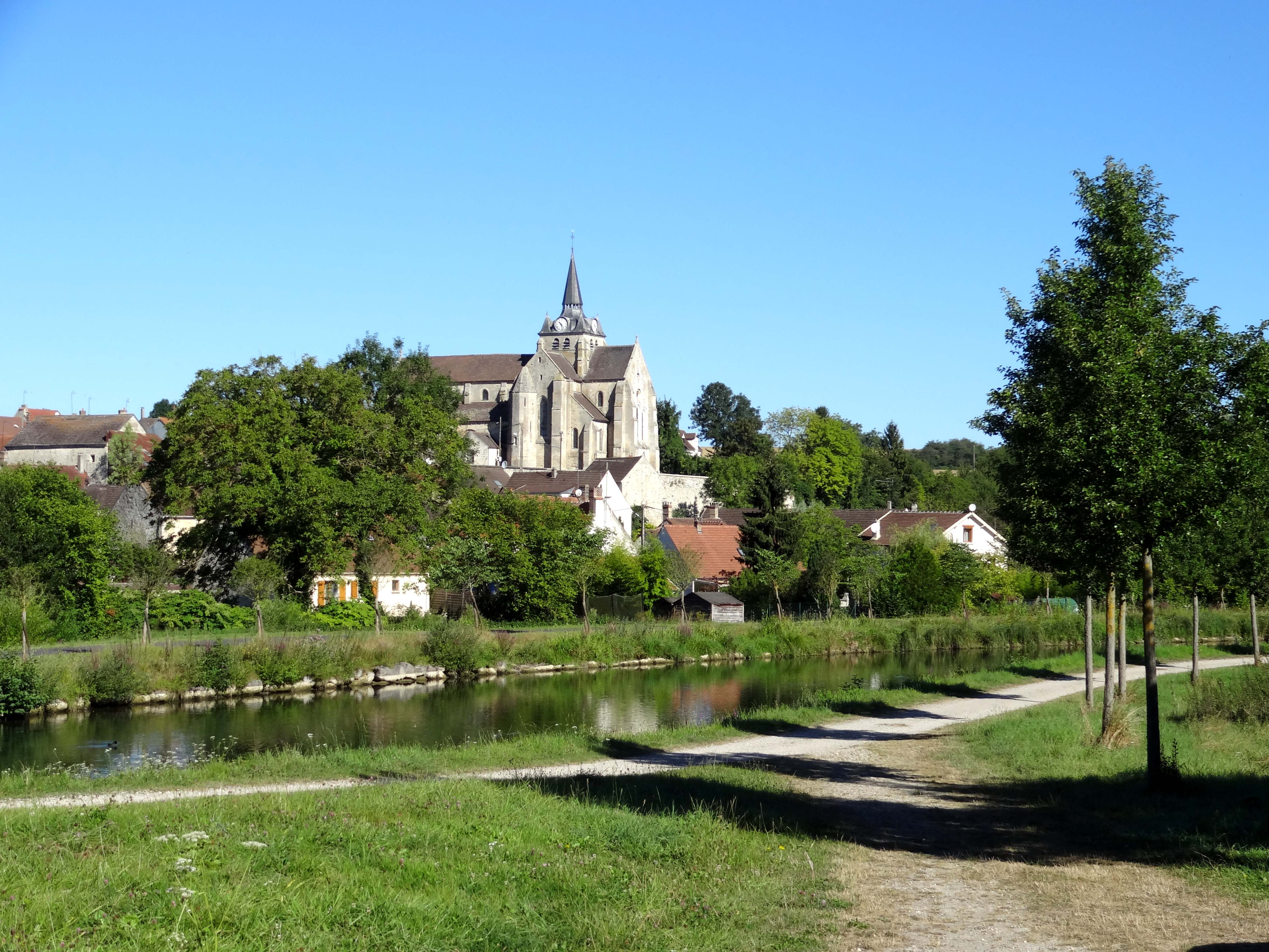 Église Saint-Martin de Mareuil-sur-Ourcq - voir titre.